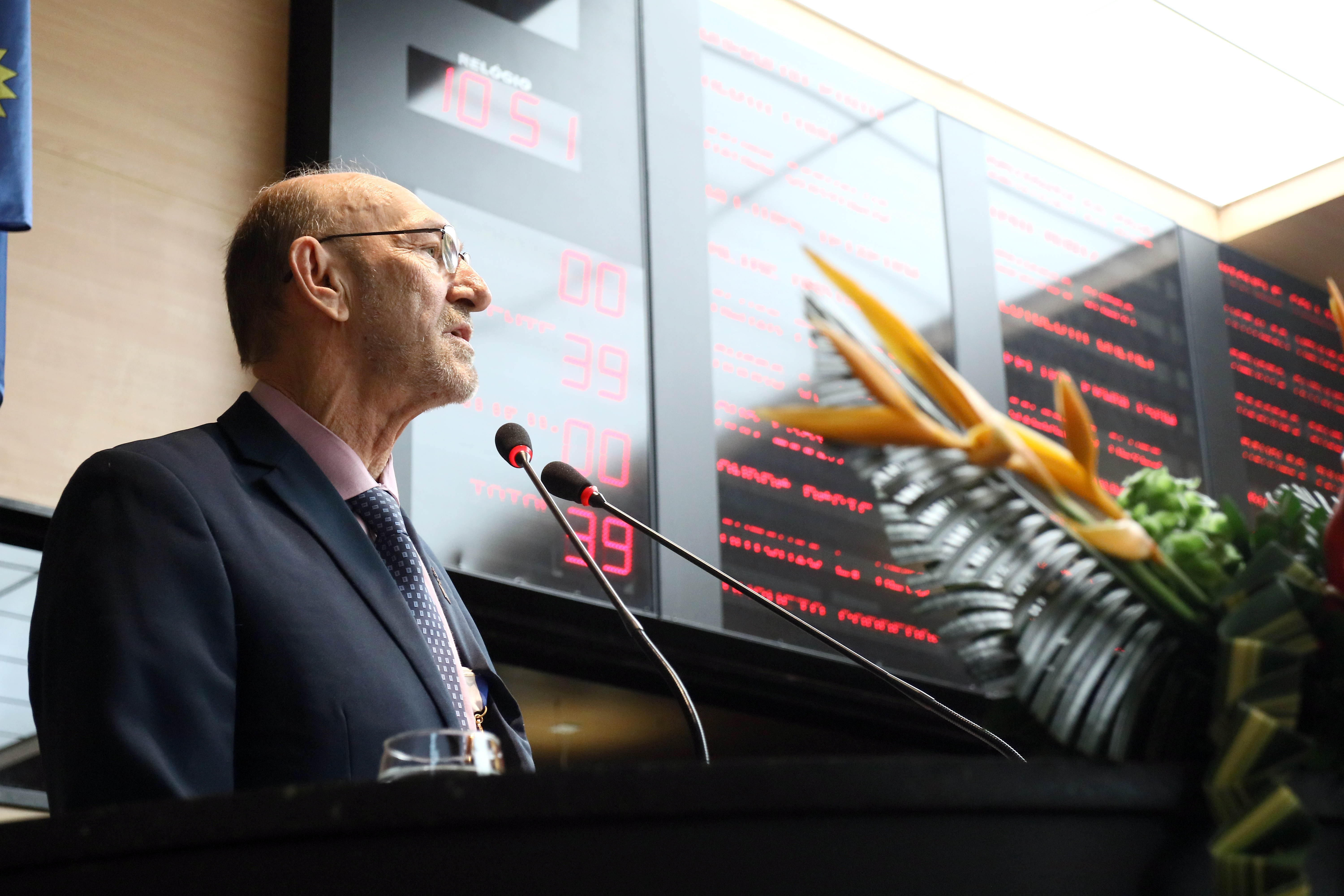 MEDALHA